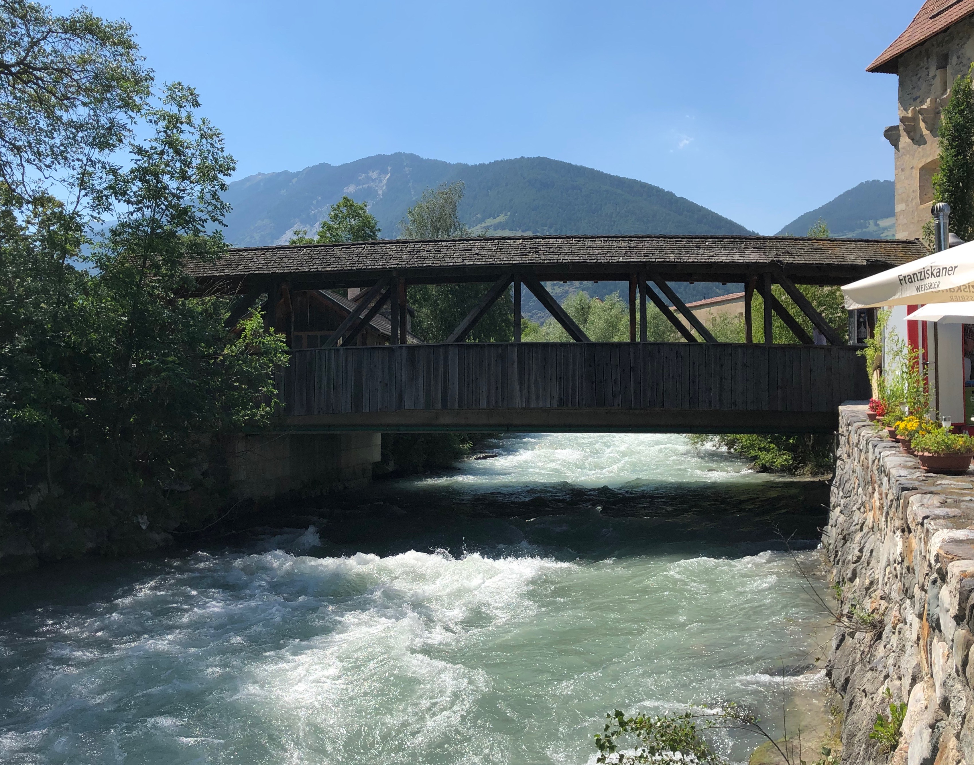 Glurns:Brücke über die Etsch